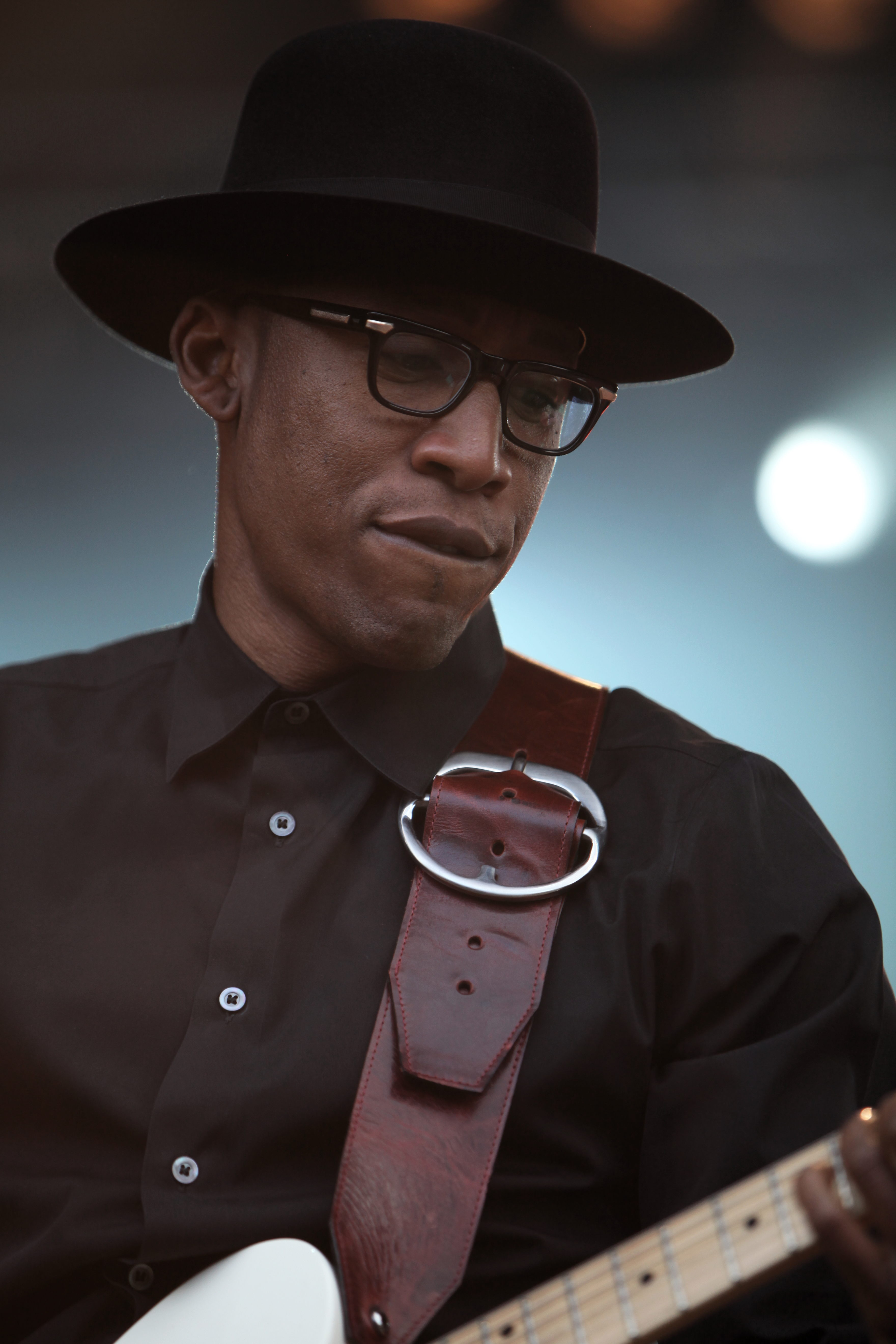 Raphael Saadiq at the Eurockéennes de Belfort 2011